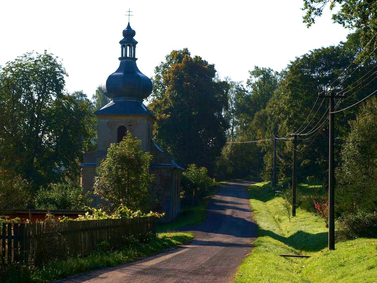 Svinov, okres Karlovy Vary